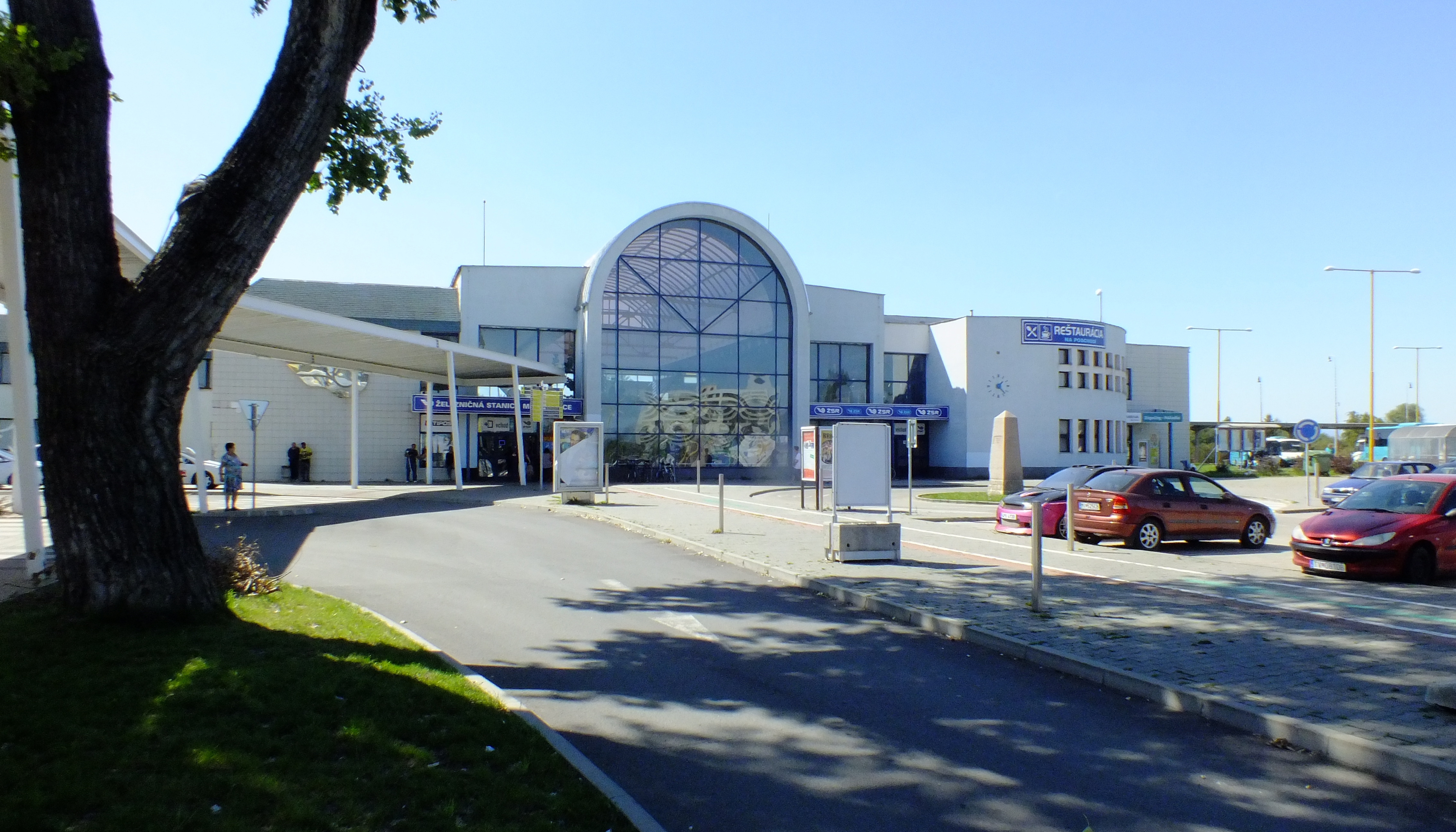 Staniční budova od ulice